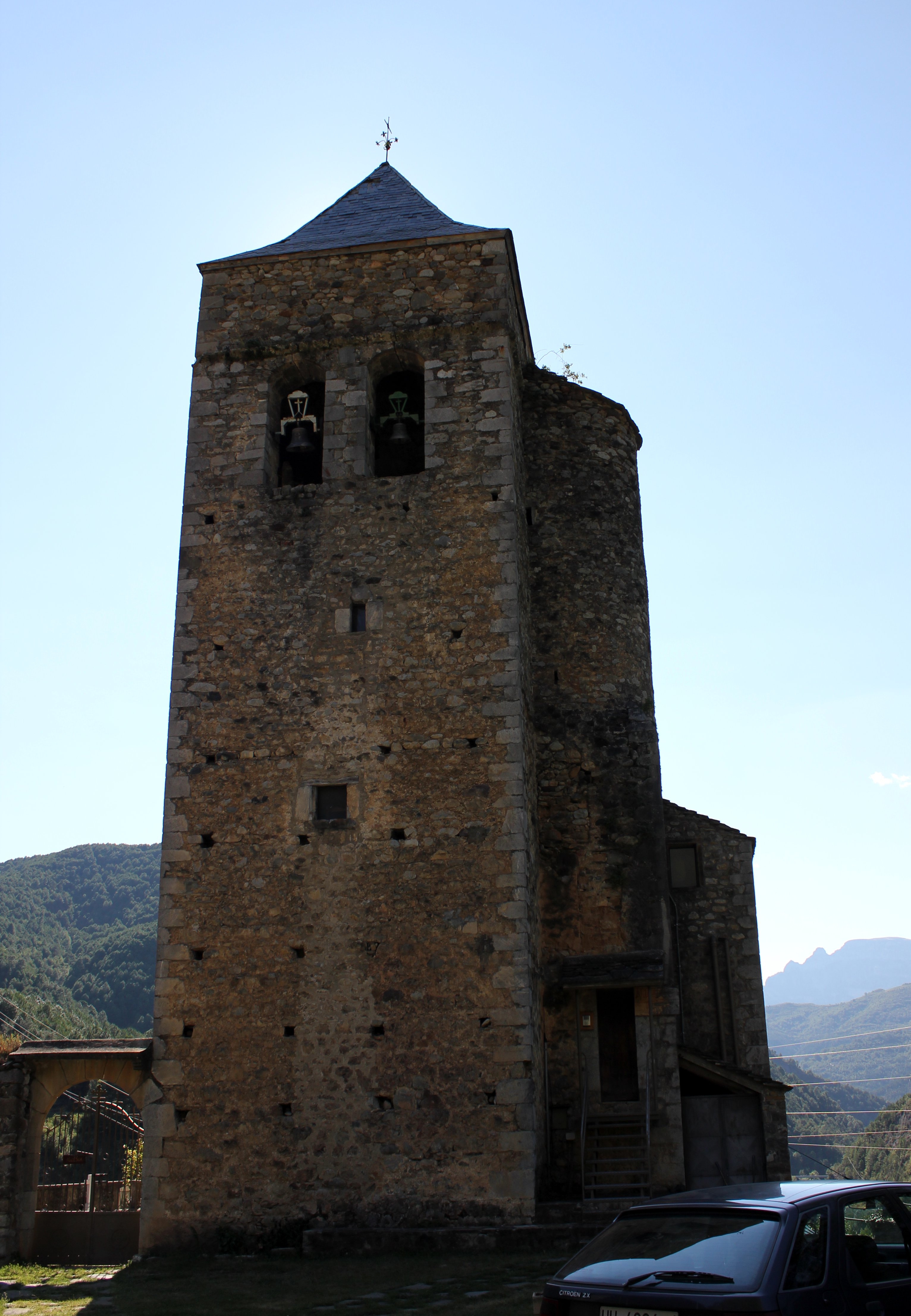 Aragonés: Ilesia de Santa María, en Badaín.